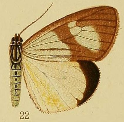 Chiromachla chalcosidia